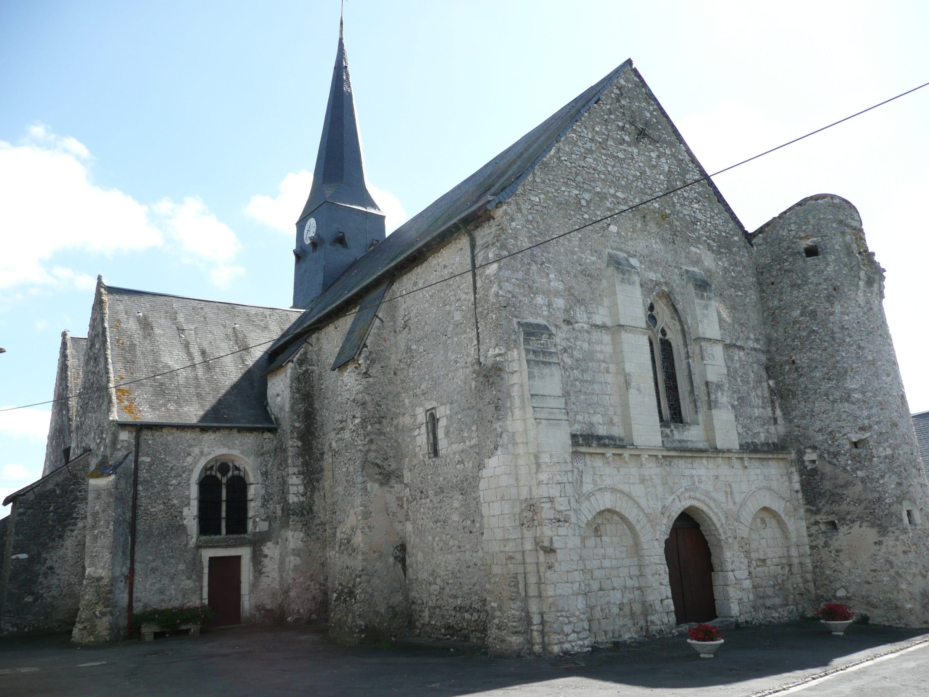 Chigné - Église .